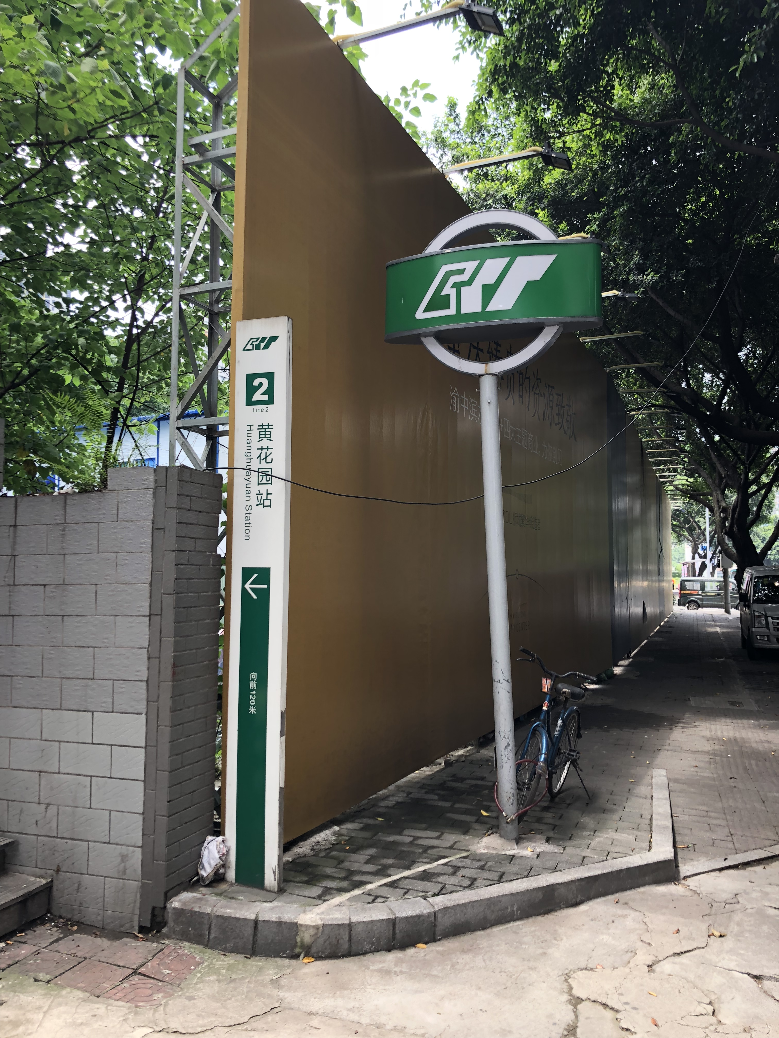 中文（中国大陆）: 2号线黄花园站嘉滨路出口